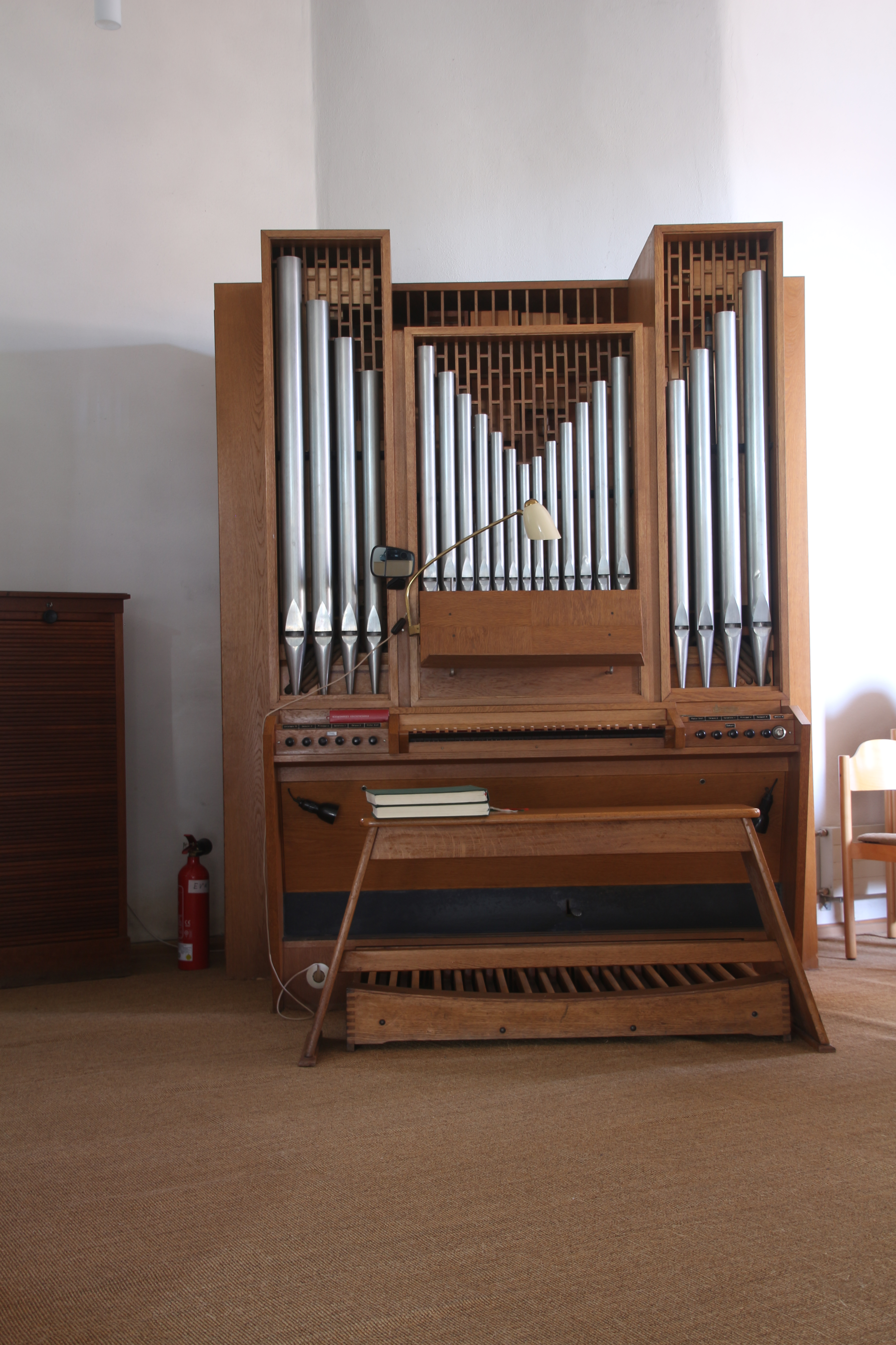 Evangelische Kirche Fauerbach, Gemeinde Nidda, Wetteraukreis, Hessen